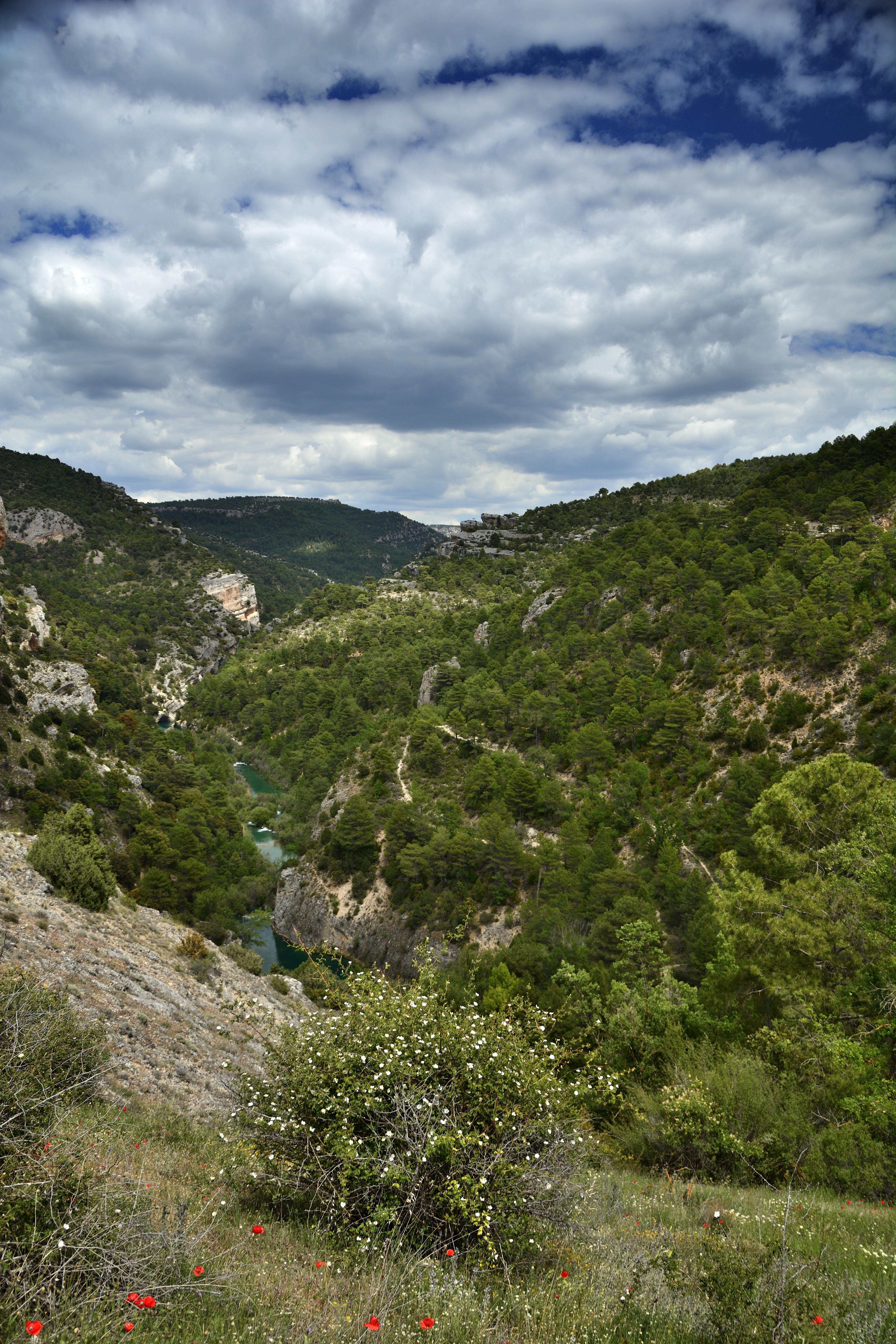 Serrania de Cuenca-Ventano del Diablo This is a photography of a Site of Community Importance in Spain with the ID: ES4230014. Natura2000 entry, EEA entry